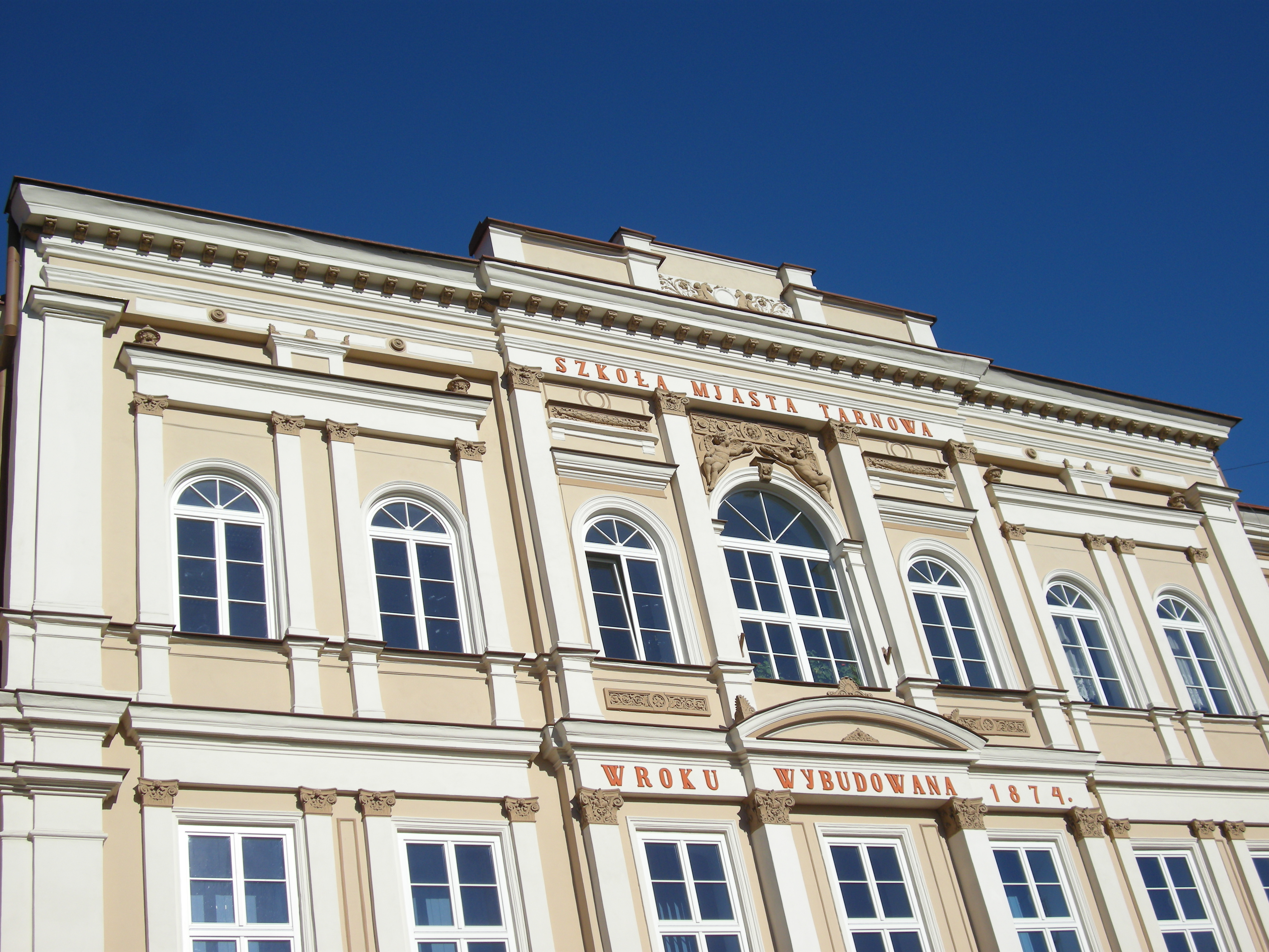 Fasada budynku szkoły miejskiej z 1874 r.